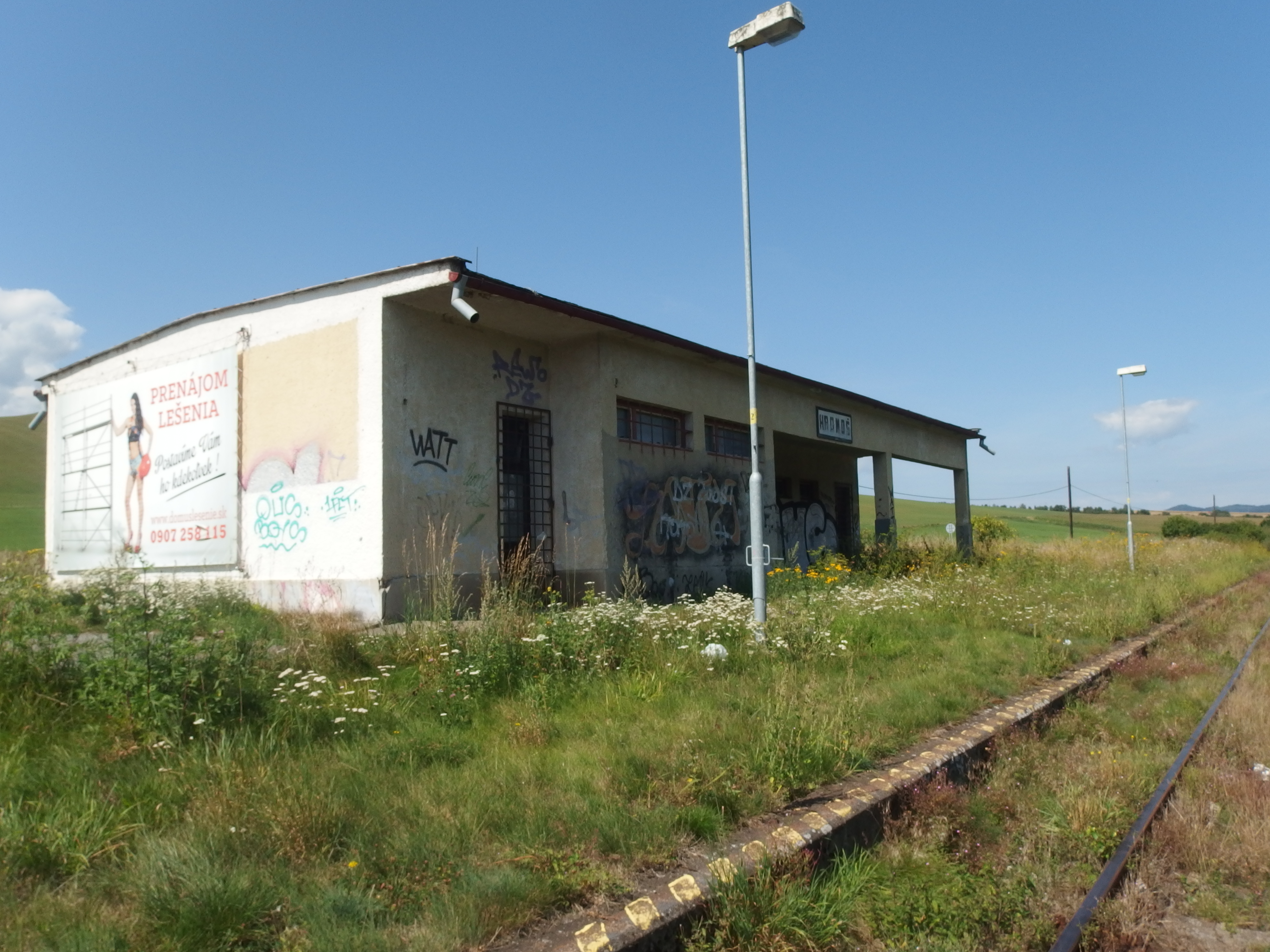 Hromoš, okres Stará Ľubovňa, železničná zastávka.